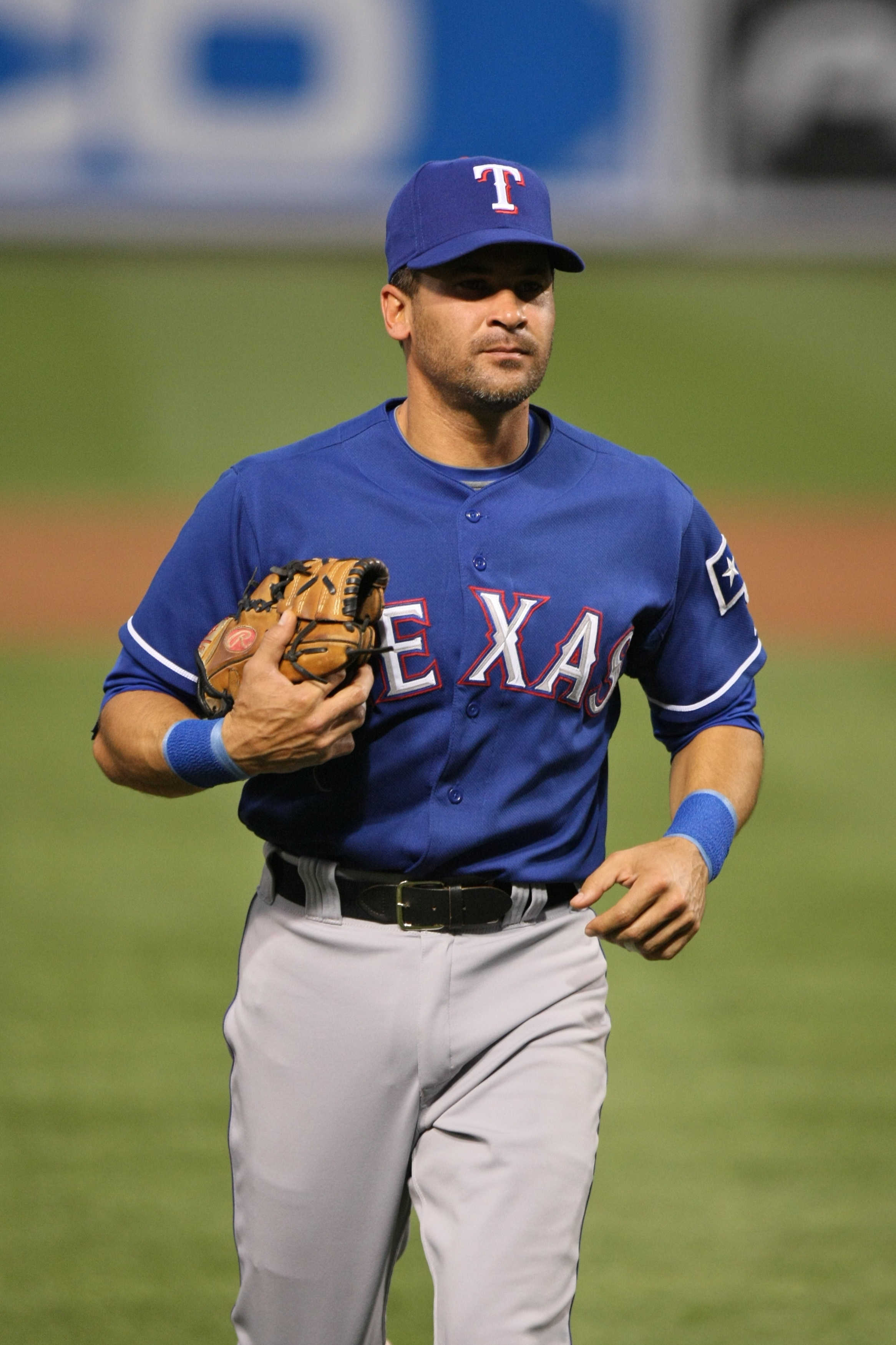 Omar Vizquel